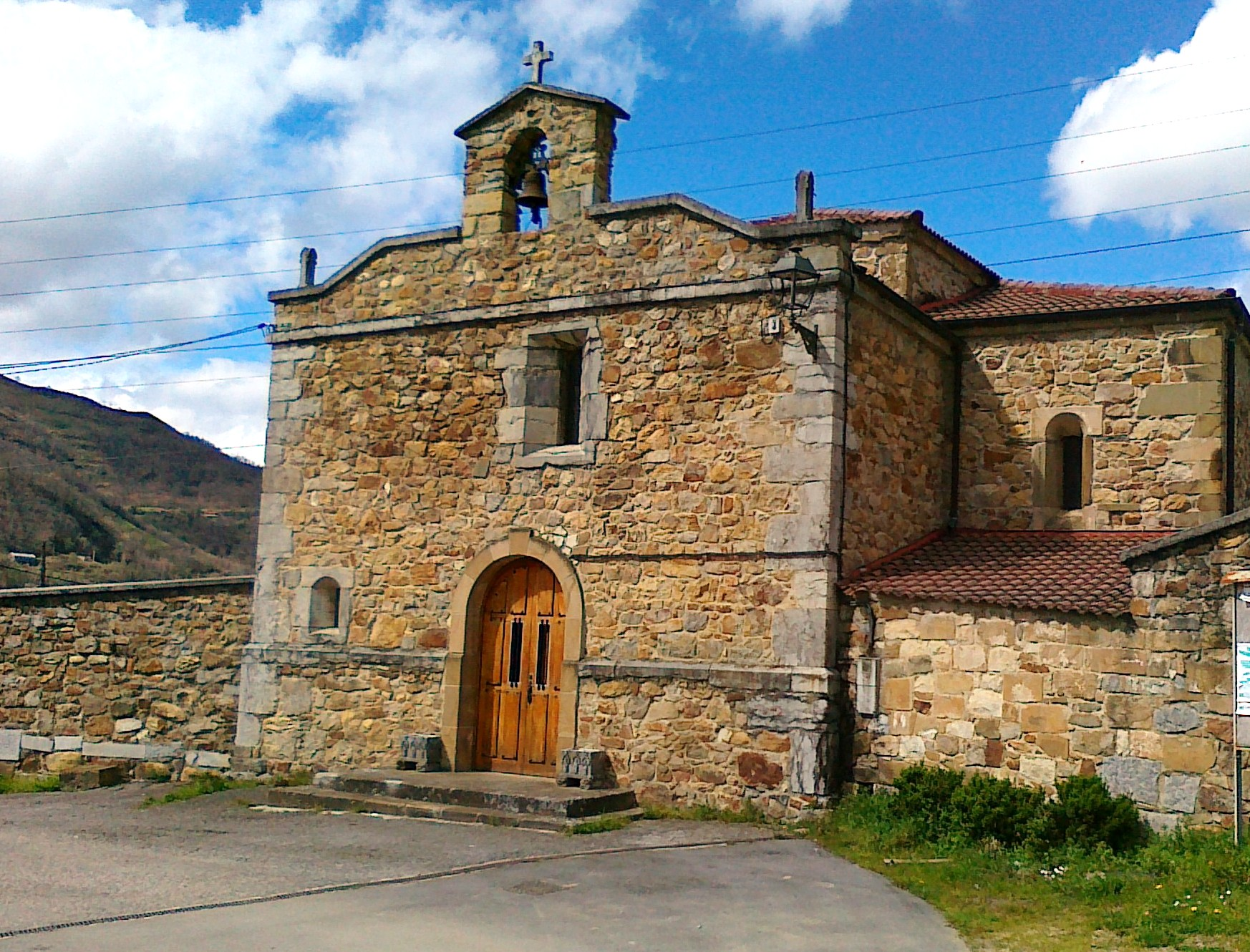 Santuario de la Virgen del Otero. Fachada principal, al este.